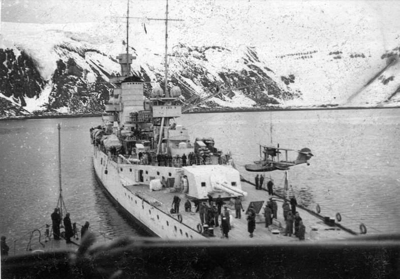 Crucero pesado ARA "Almirante Brown" fondeado en aguas de la Antártida y captado desde la cubierta del ARA "25 de Mayo". Junto a él se aprecia una hidrocanoa anfibia Supermarine Walrus 315.